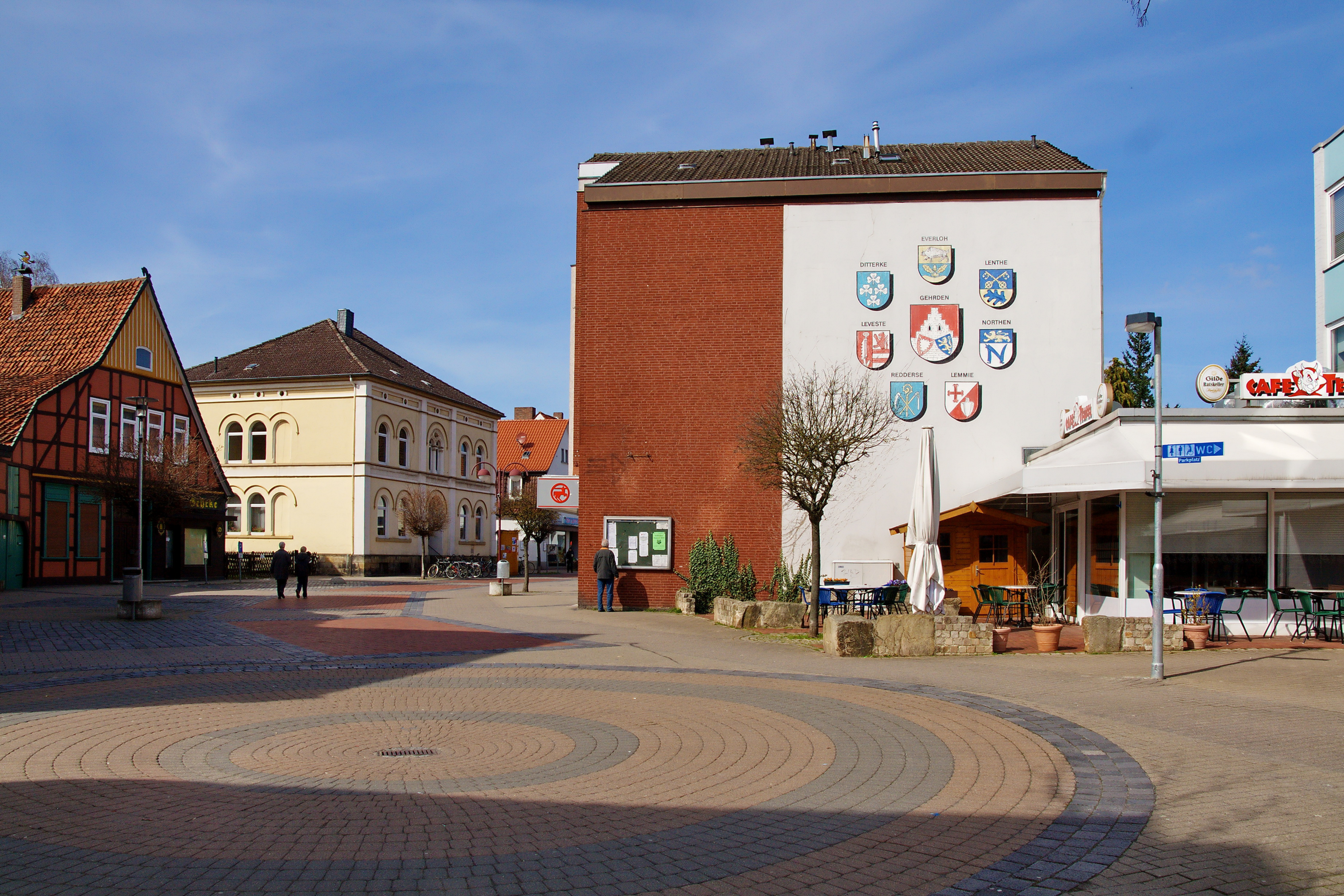 Ortsblick Gehrden, Niedersachsen, Deutschland